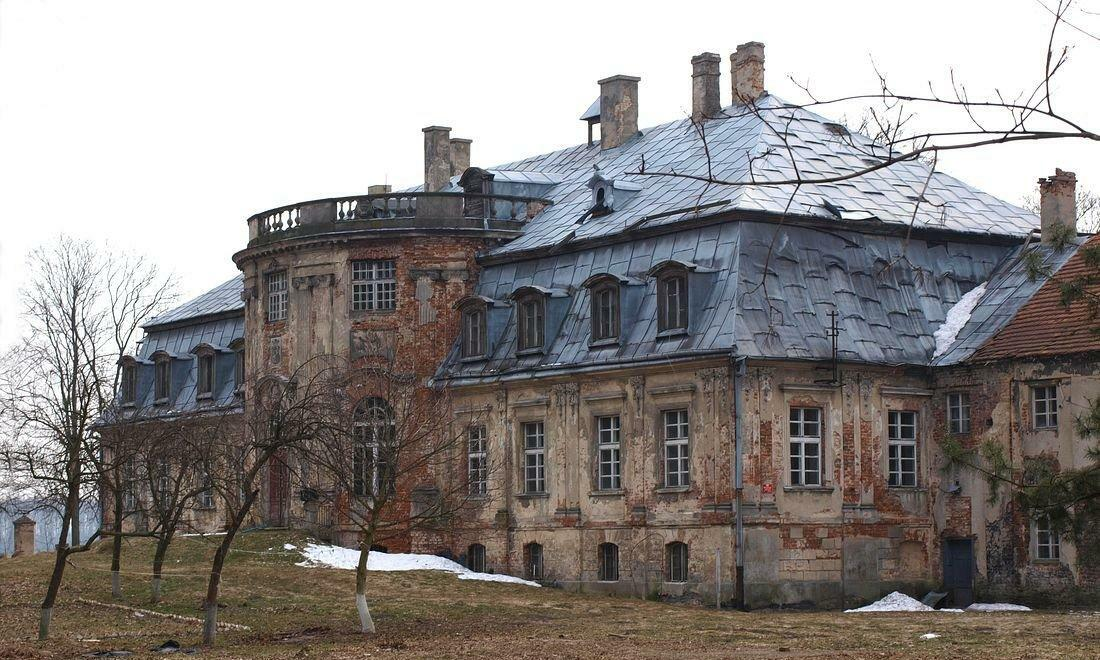 Pałac w Minkowskich - fragment elewacji ogrodowej.